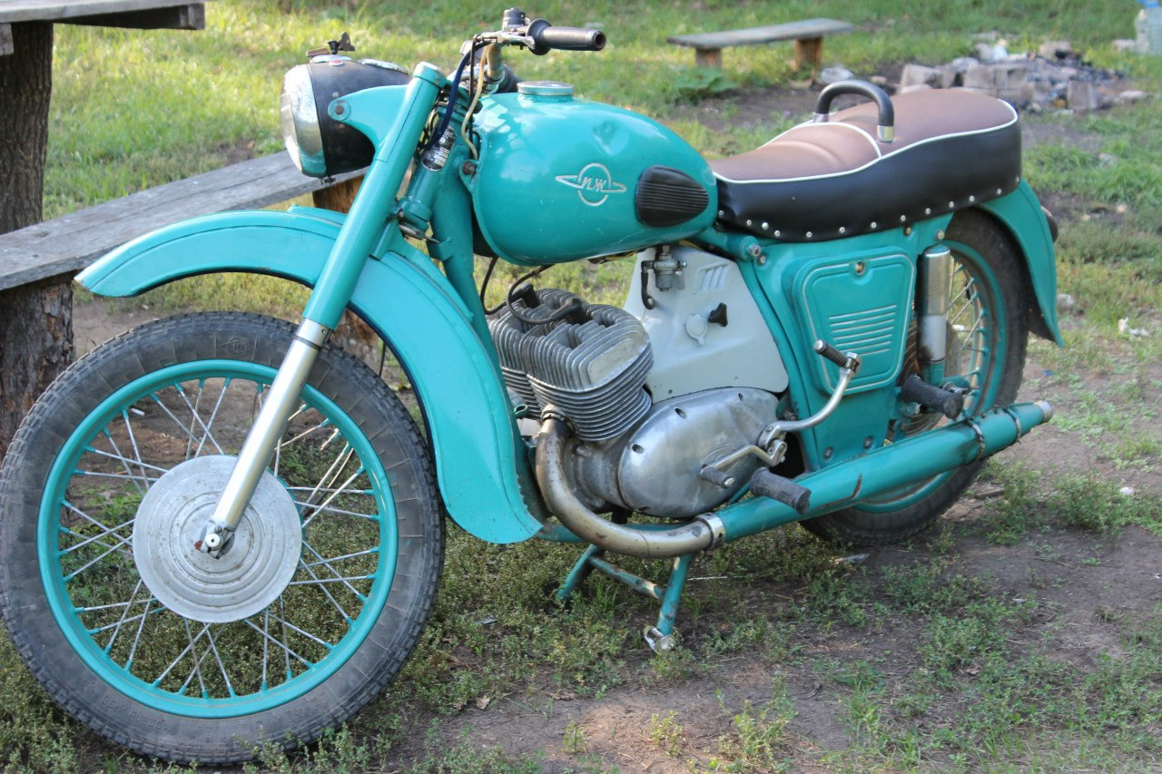 ИЖ после ремонта